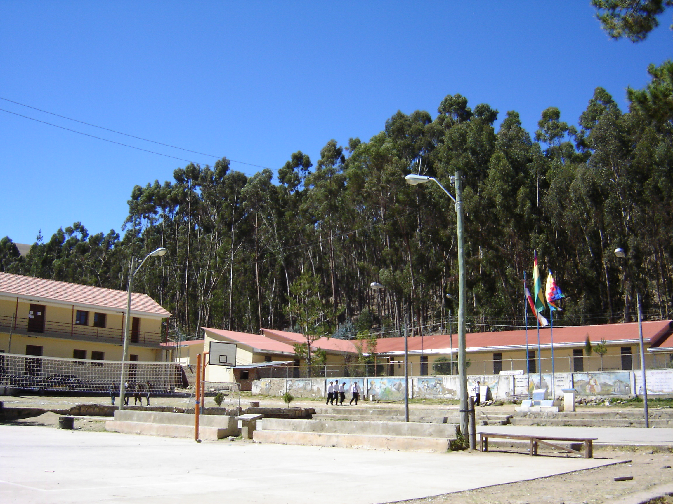 Vista interna del edificio central del Instituto Normal Superior de Vacas